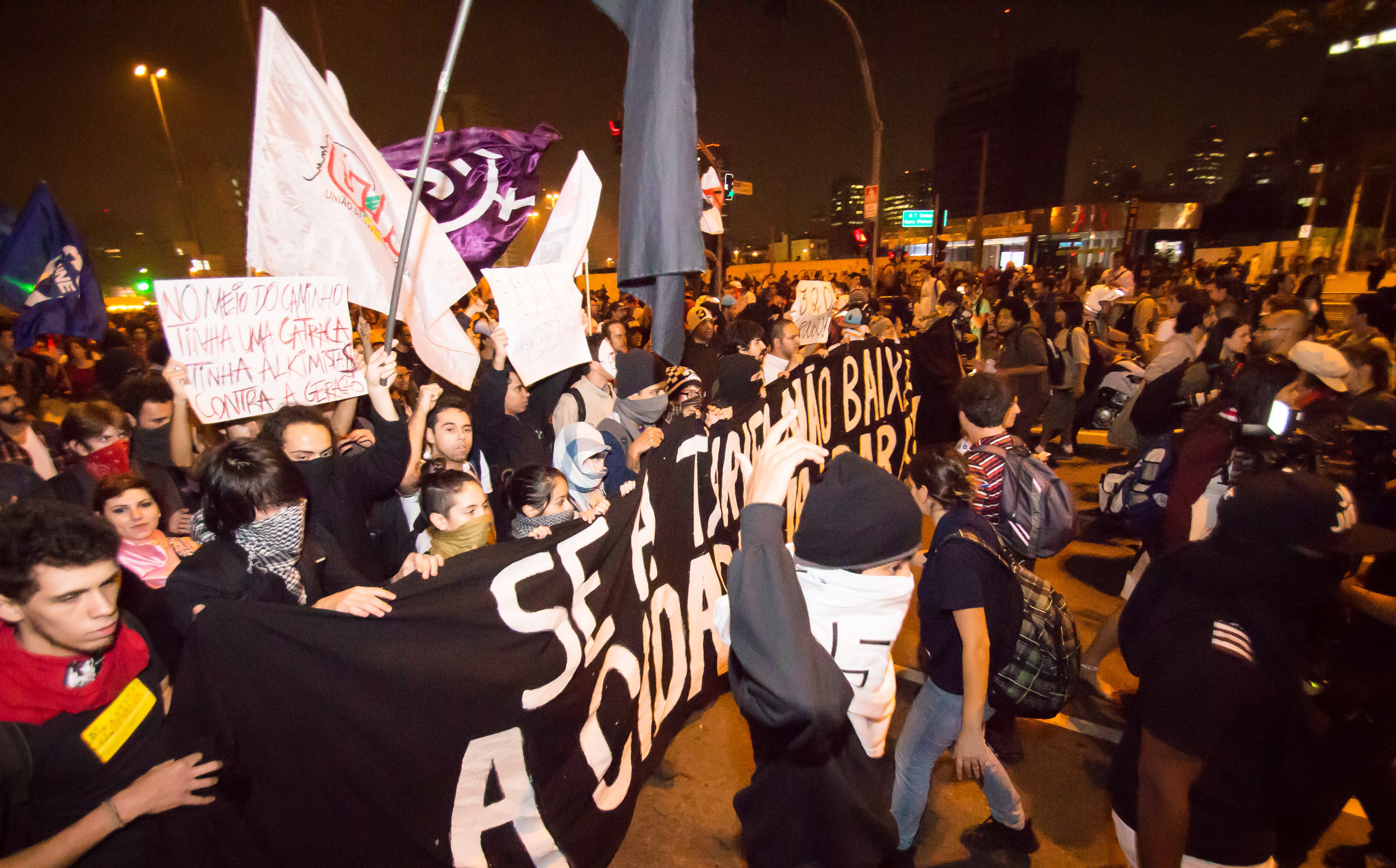 Protesto do Movimento Passe Livre (MPL) em junho de 2013.